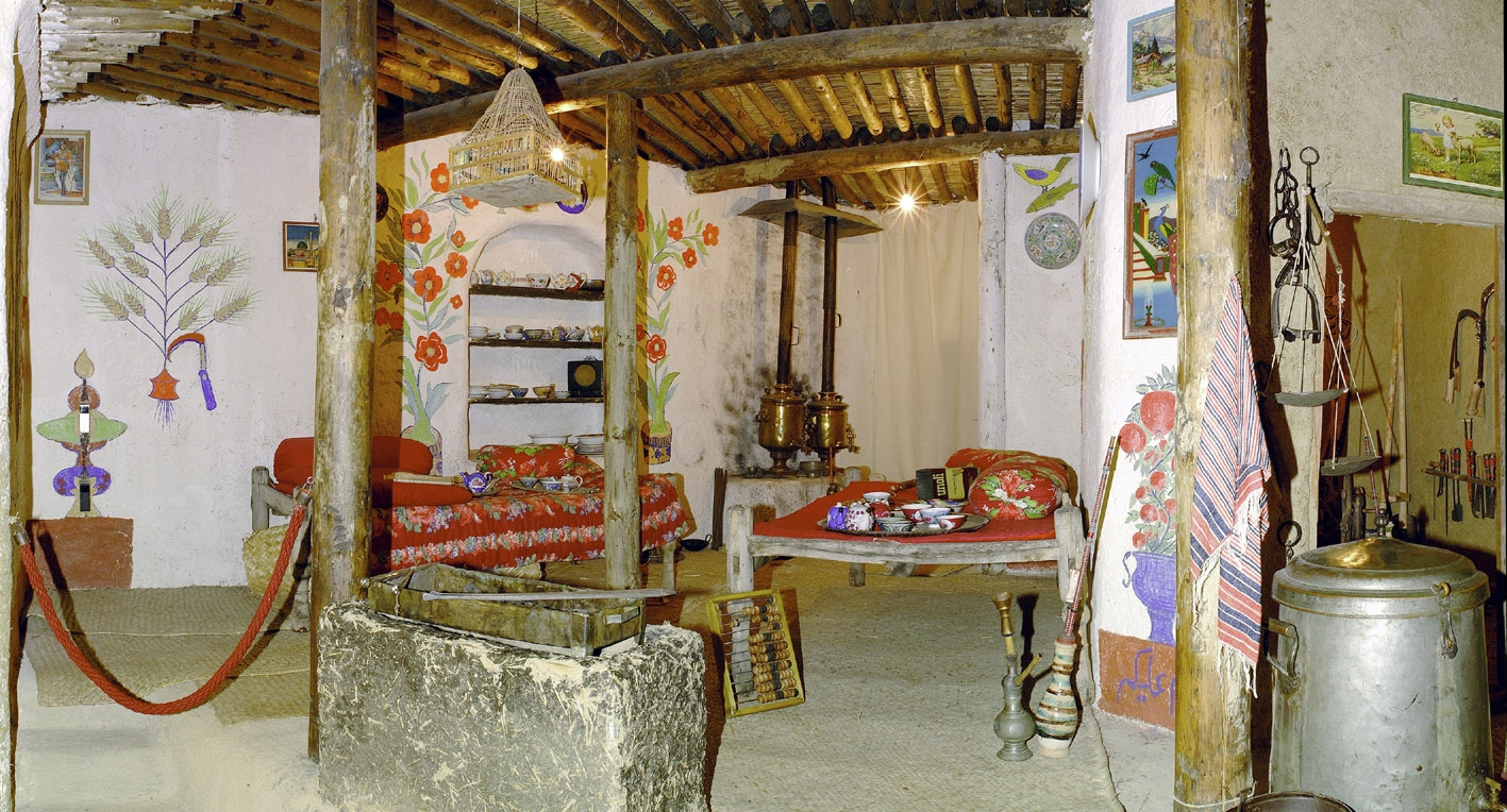 Rekonstruierte Straße aus dem Bazar von Taschkurgan, Afghanistan. Orient-Sammlung des Linden-Museums Stuttgart.